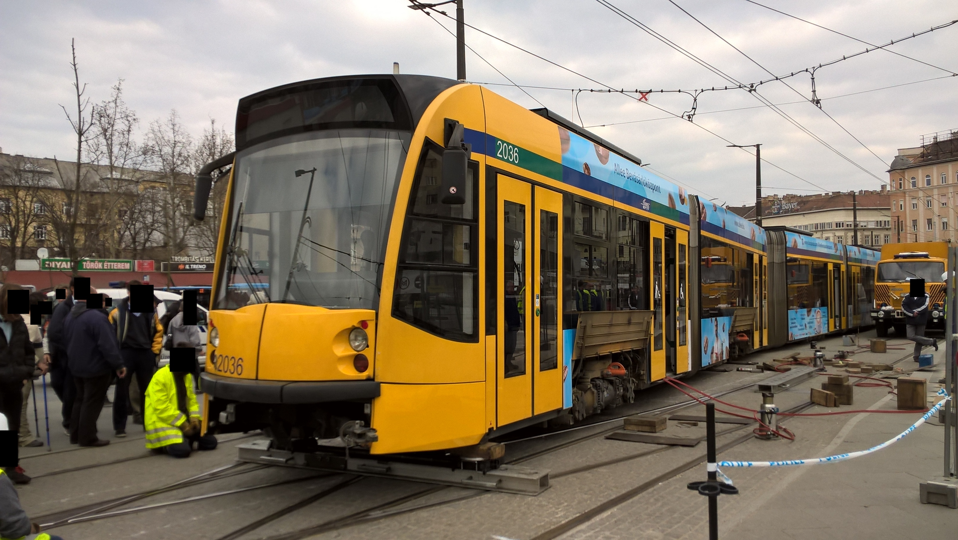 A 2016. március 21-én aláváltás miatt kisiklott 2036-os pályaszámú Siemens Combino Supra Budapest NF12B műszaki mentése a budapesti Széll Kálmán téren